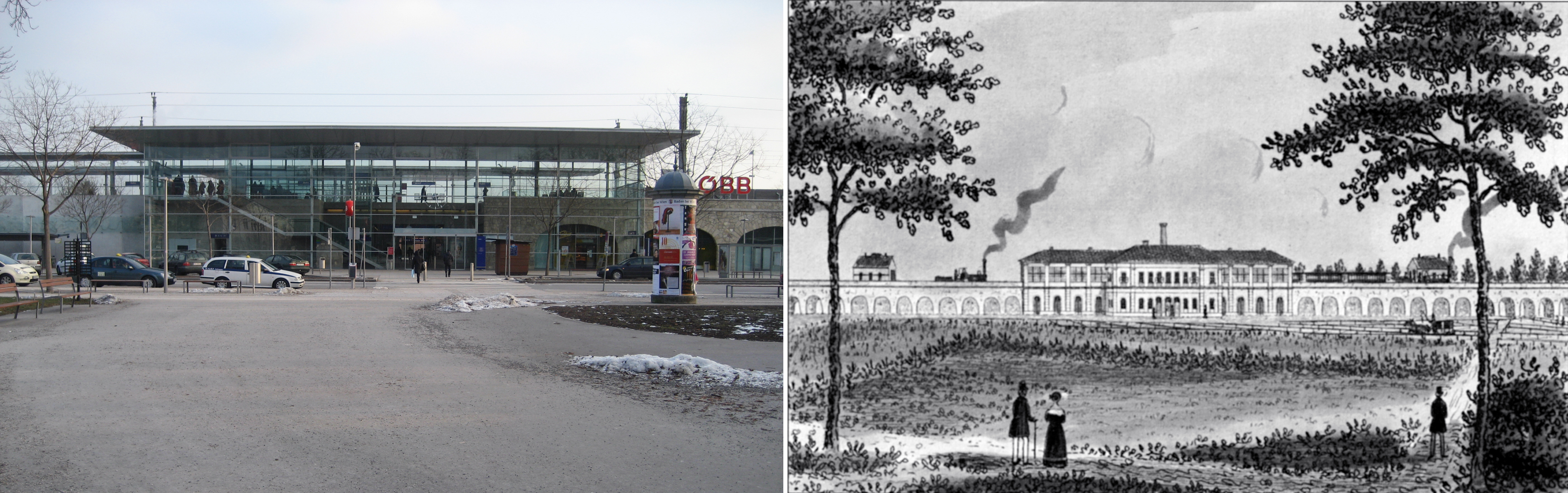 Bahnhof Baden 2010/1841